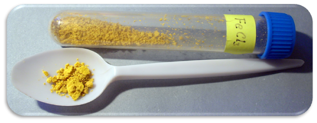 Chlorid železitý - FeCl3